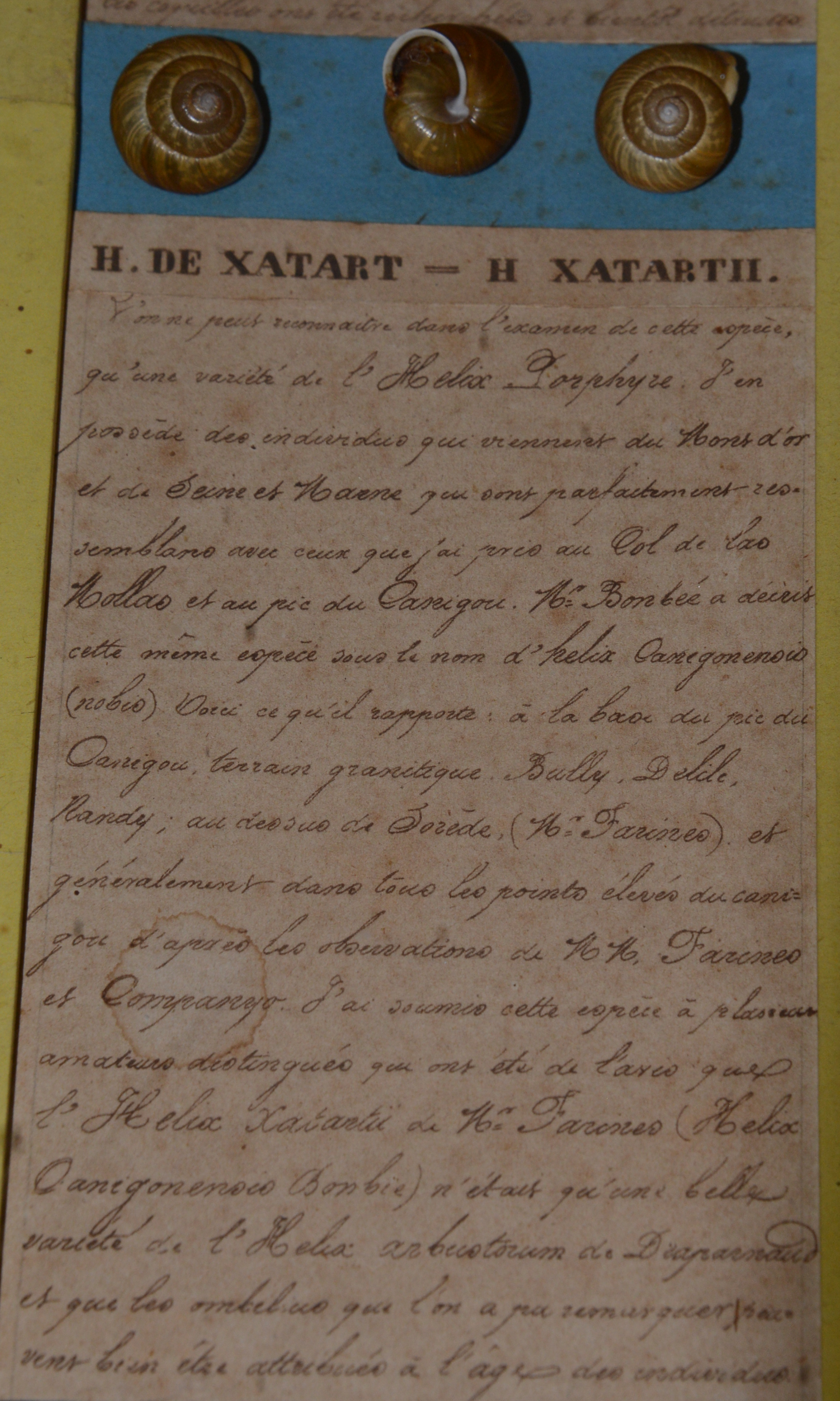 Description d'Arianta xatartii, partie d'un « tableau fait et offert à la société philomatique de Perpignan, par Mr Aleron, le 6 avril 1836 », exposé au muséum d'histoire naturelle de Perpignan. Transcription : « L'on ne peut reconnaître dans l'examen de cette espèce, qu'une variété de l'Helix Porphyre. J'en possède des individus qui viennent du Mont d'or et de Seine et Marne qui sont parfaitement ressemblans avec ceux que j'ai pris au Col de las Mollas et au pic du Canigou. Mr Bonbée (?) a décris cette même espèce sous le nom d'helix Canigonensis (nobis (?). Voici ce qu'il rapporte : à la base du pic du Canigou, terrain granitique. Bully (?), Delile (?), Randy (?) ; au dessus de Sorède (Mr Farines) et généralement dans tous les points élevés du canigou d'après les observations de MM. Farines et Companyo. J'ai soumis cette espèce à plusieurs amateurs distingués, qui ont été de l'avis que l'Helix xatartii de Mr Farines (Helix Canigonensis Bonbie (?) n'était qu'une belle variété de l'Helix arbustorum de Diaparnaud (?) et que les ombelius (?) que l'on a pu remarquer peuvent bien être attribués à l'âge des individus.